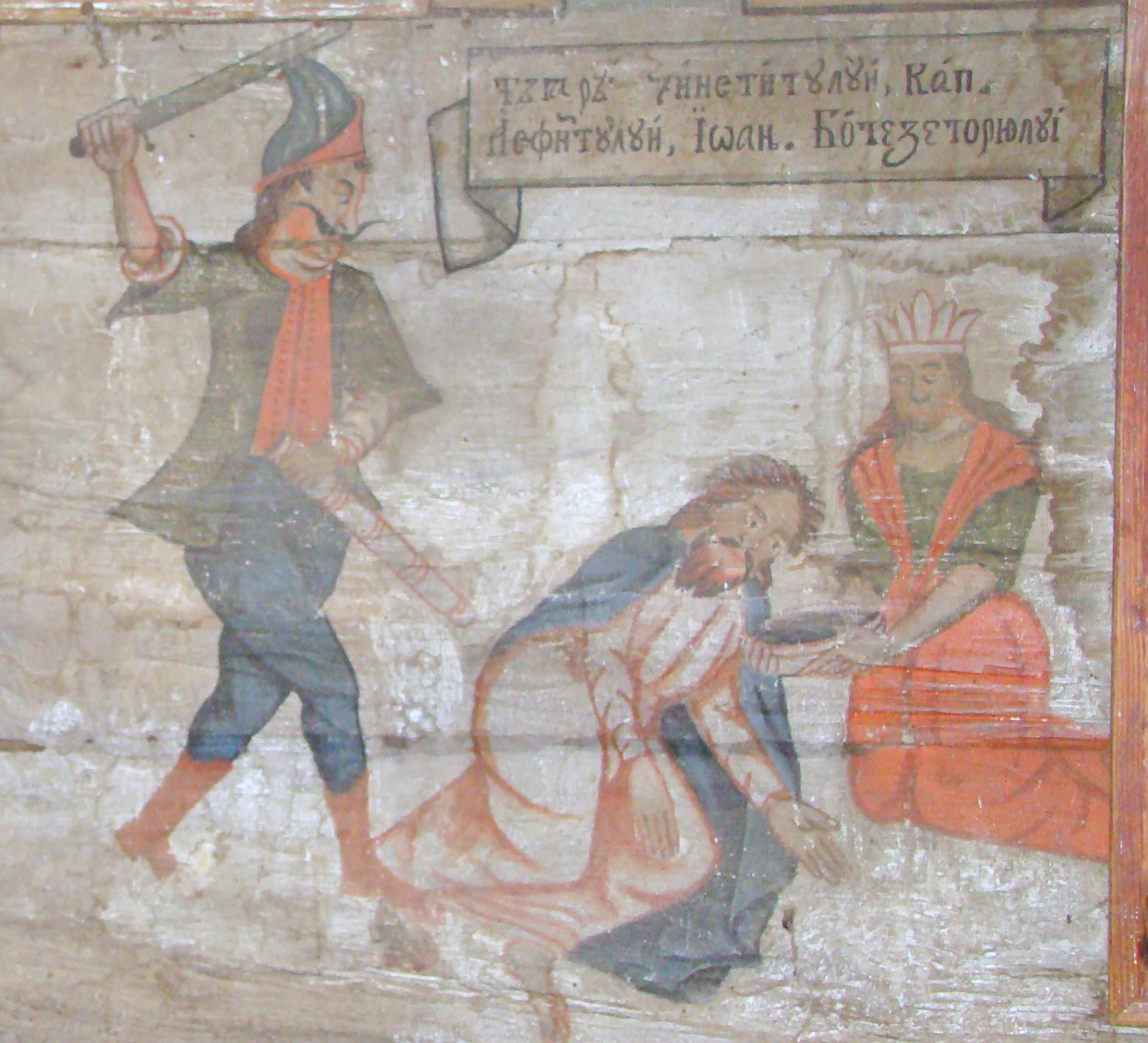 Biserica de lemn „Sf. Arhangheli Mihail și Gavril”